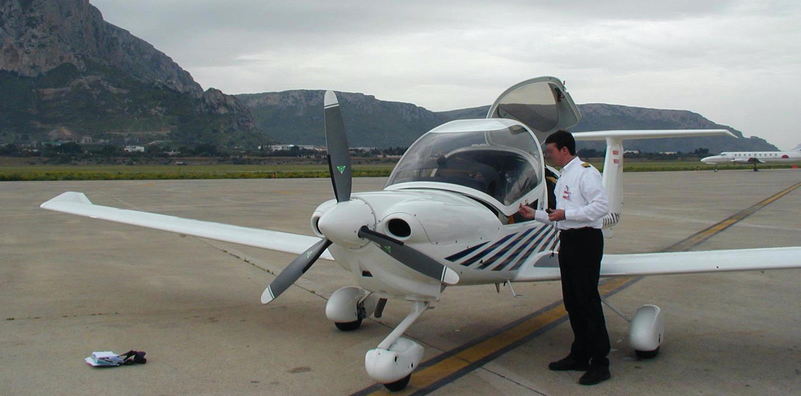 Diamond DA40 180, Airport LICJ (Palermo)